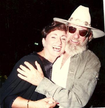 he:רפי נלסון וhe:רחל הרמתי